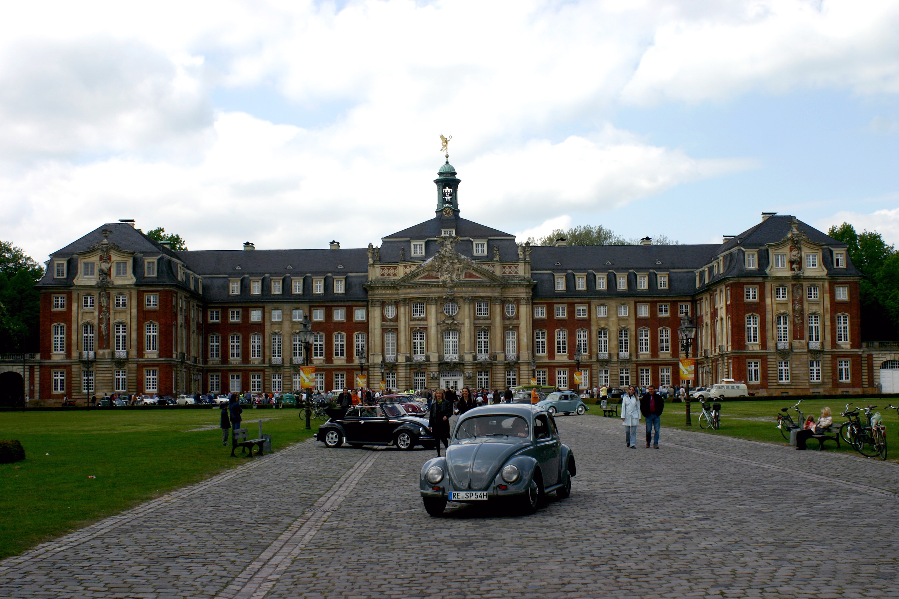 Schloss in Münster während des 3. Internationalen VW-Treffen für VW-Käfer & Co